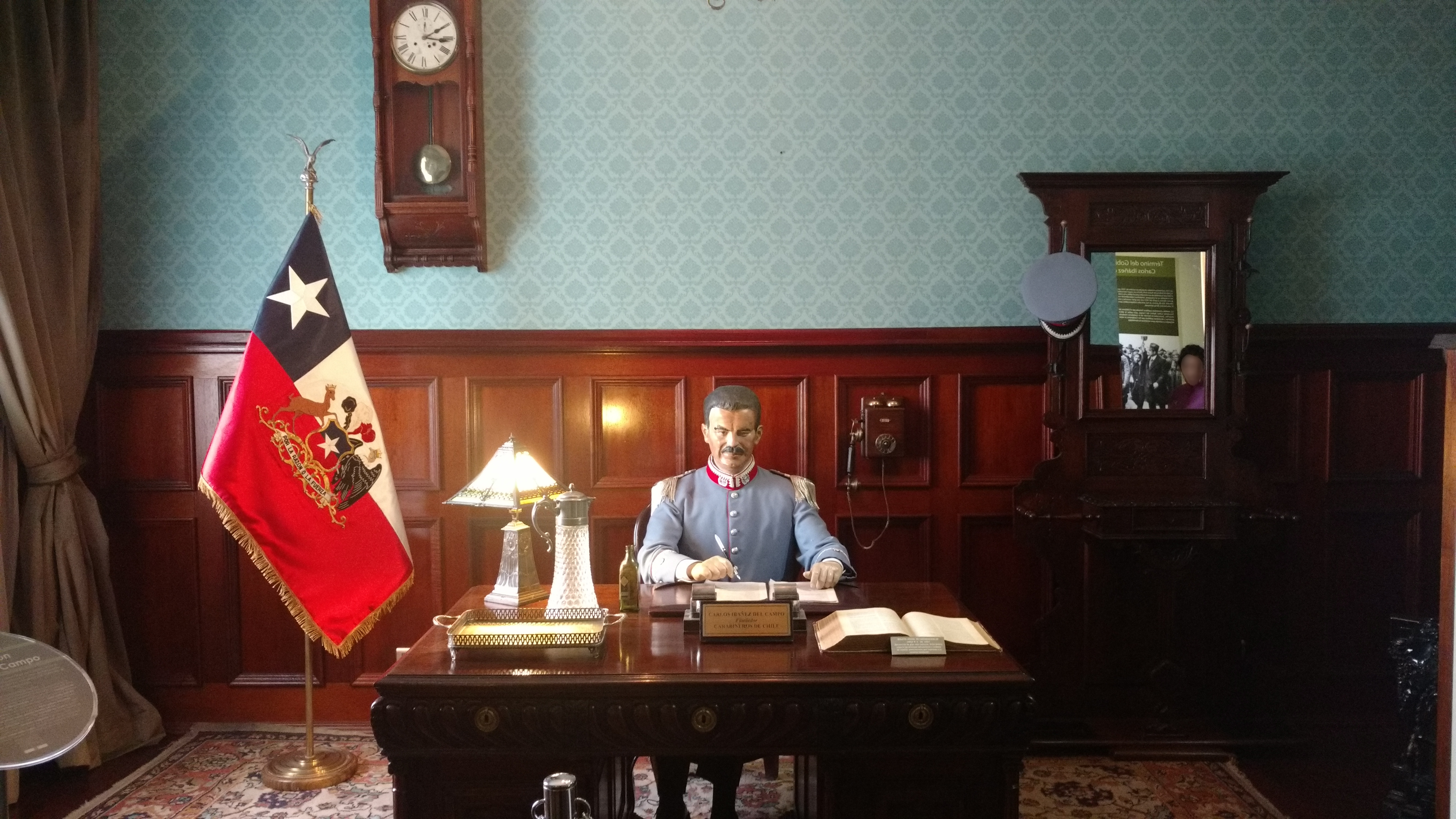 Se encuentra en el Museo Histórico de Carabineros de Chile